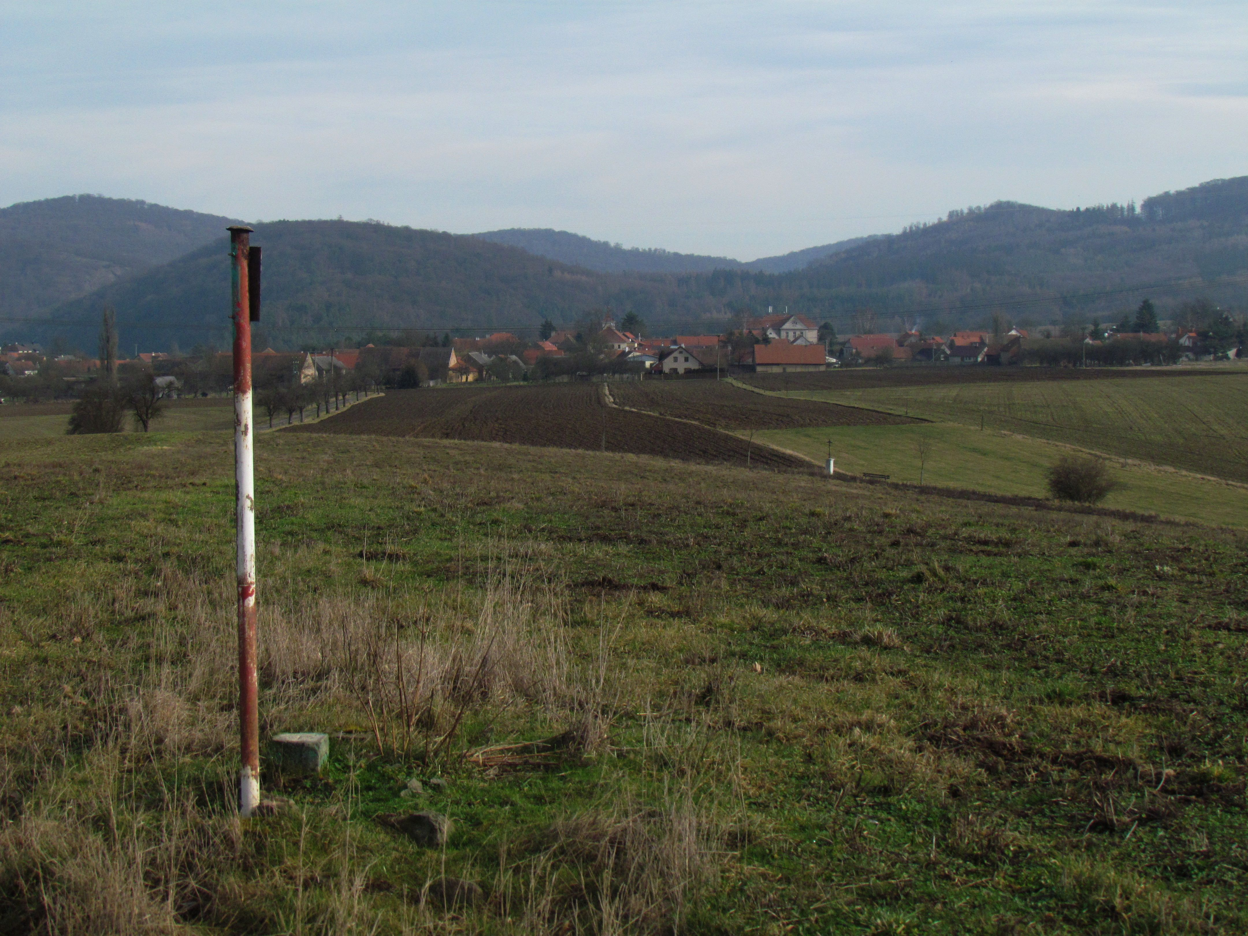 Vrchol Na Plazích. V pozadí obec Skryje.